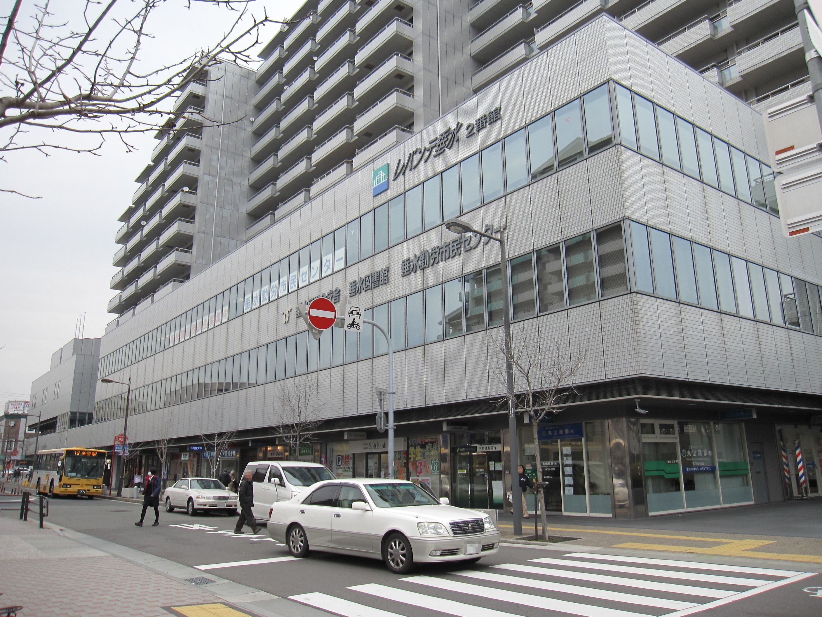 垂水区役所